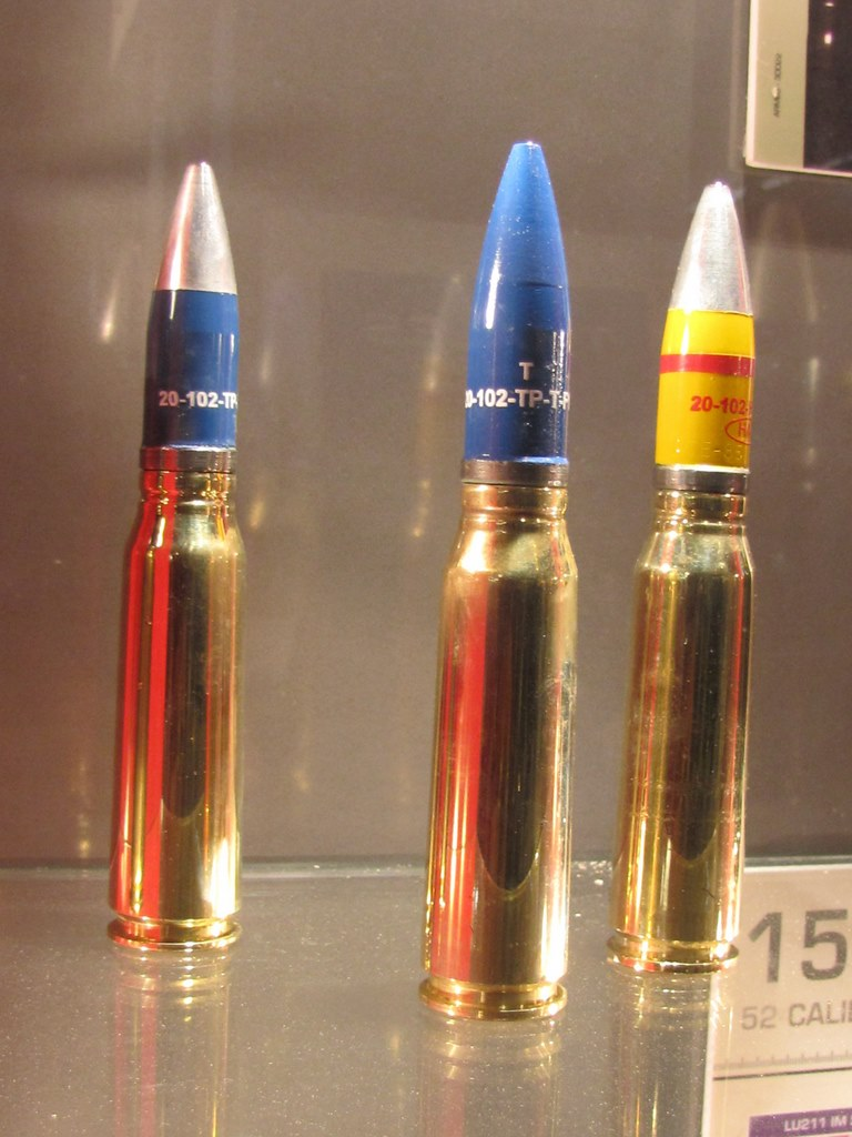 Bullets